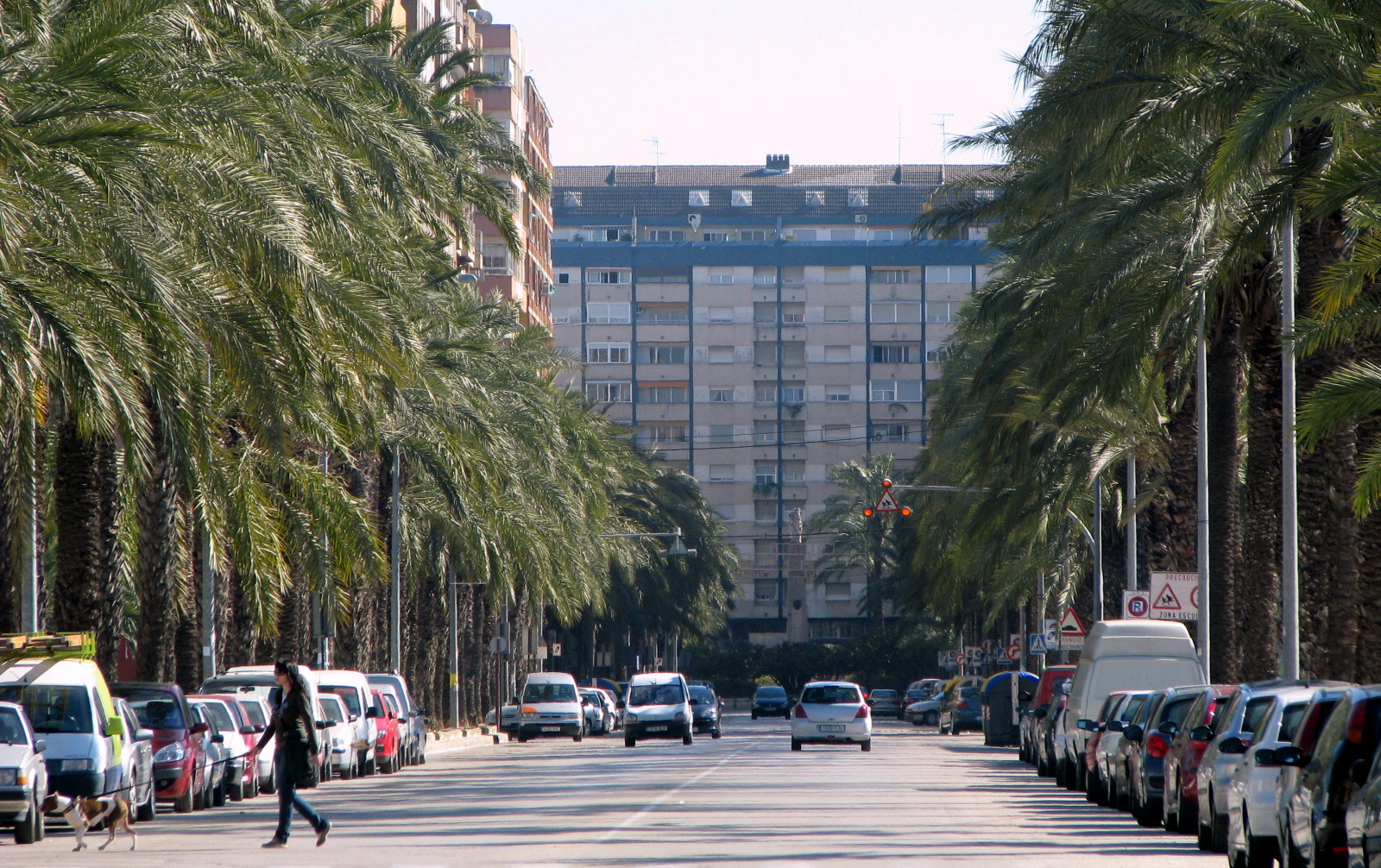 Avenida Luis Suñer. Alzira (España)